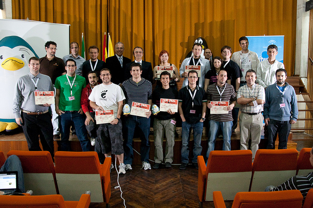 Final del IV Concurso Universitario de Software Libre, celebrada en la Escuela Superior de Ingeniería de la Universidad de Cádiz. Fotografía del viernes día 14, Realizada por José Tomás Tocino.